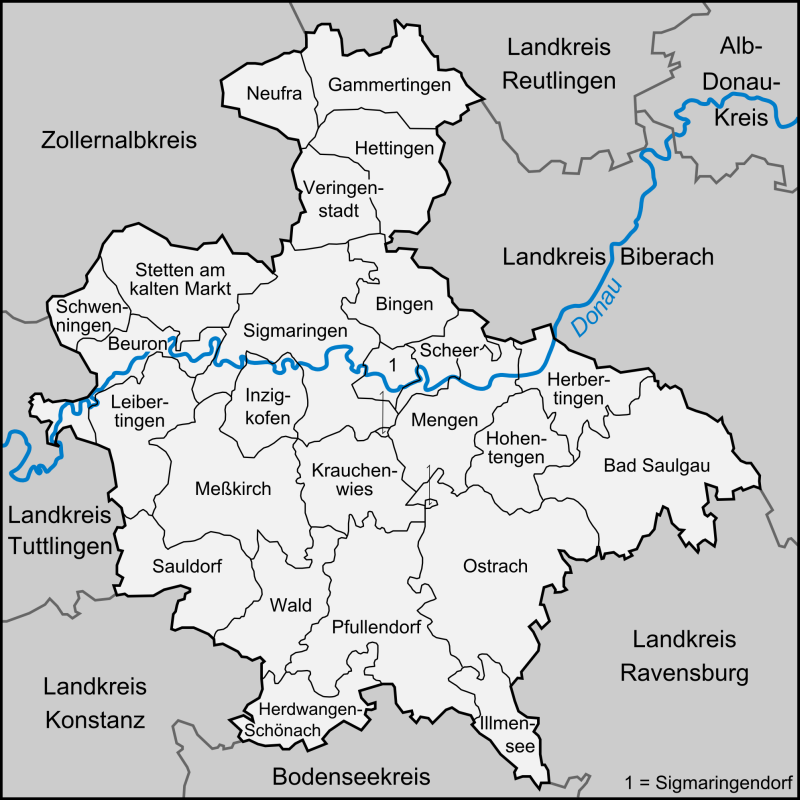 Gemeinden im Landkreis Sigmaringen